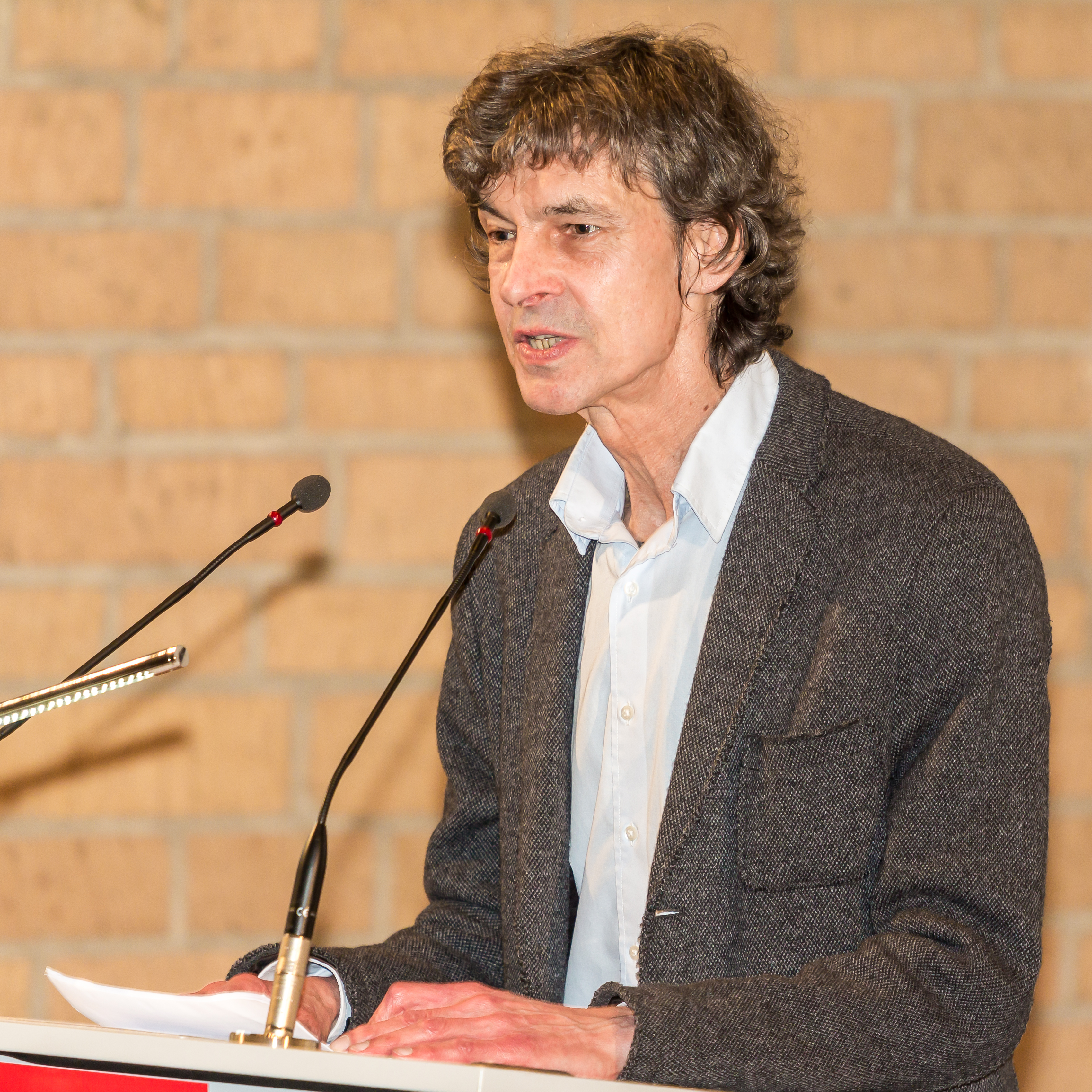 Verleihung des Heinrich-Böll-Preises an die Literaturnobelpreisträgerin Herta Müller durch Kölns Oberbürgermeisterin Henriette Reker Foto: Laudator Prof. Friedmar Apel